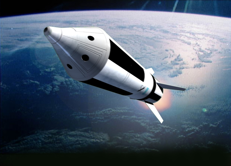 Representacion artistica del Gauchito/Vehiculo Espacial Suborbital Argentino